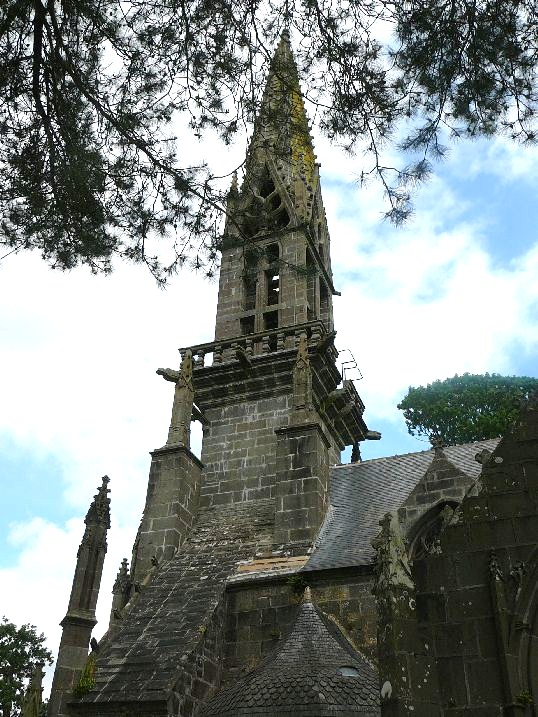 Le clocher de l'église Notre-Dame de Rumengol sur la commune du Faou dans le département français du Finistère.